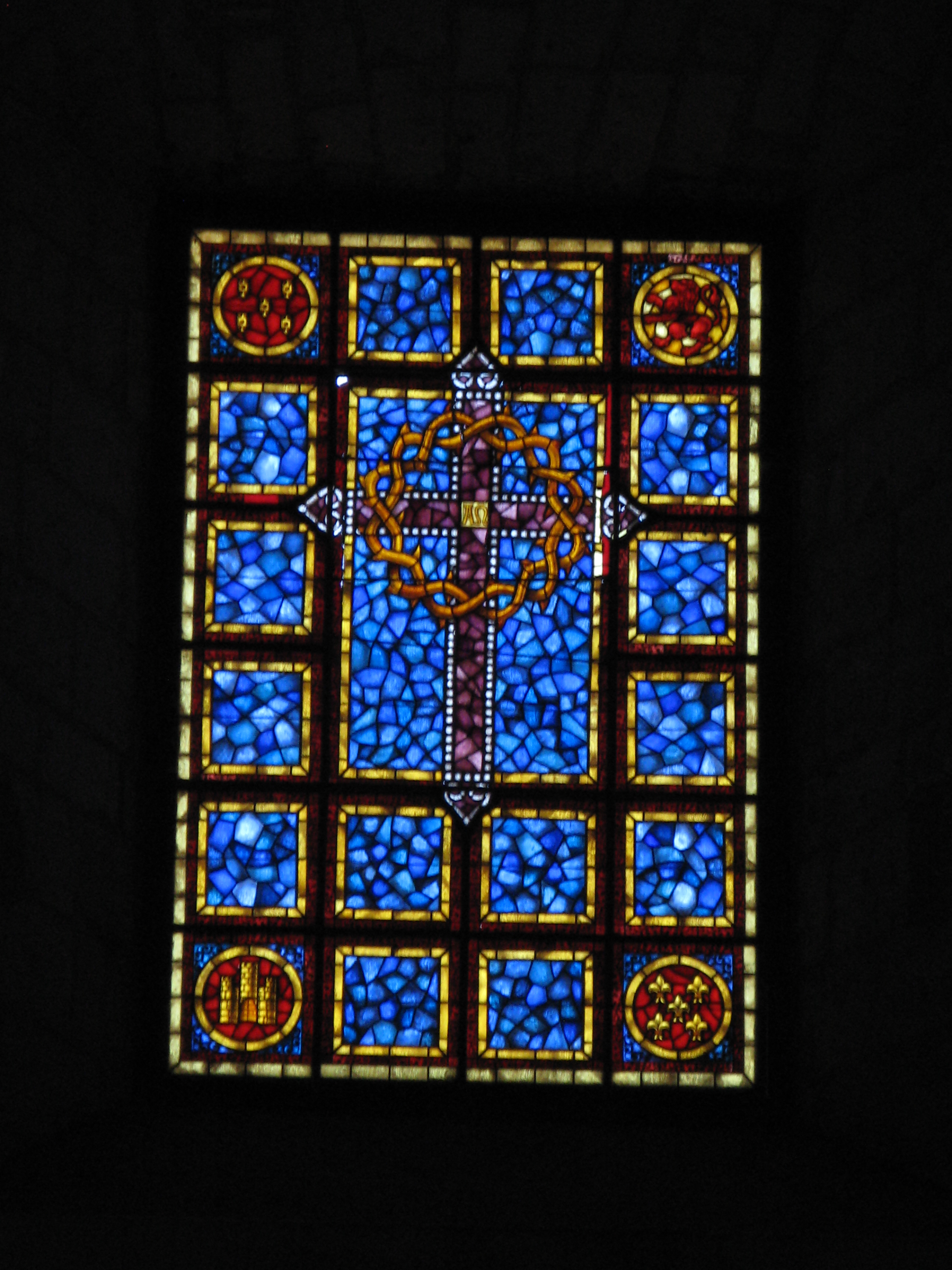 Monasterio de La Santa Espina